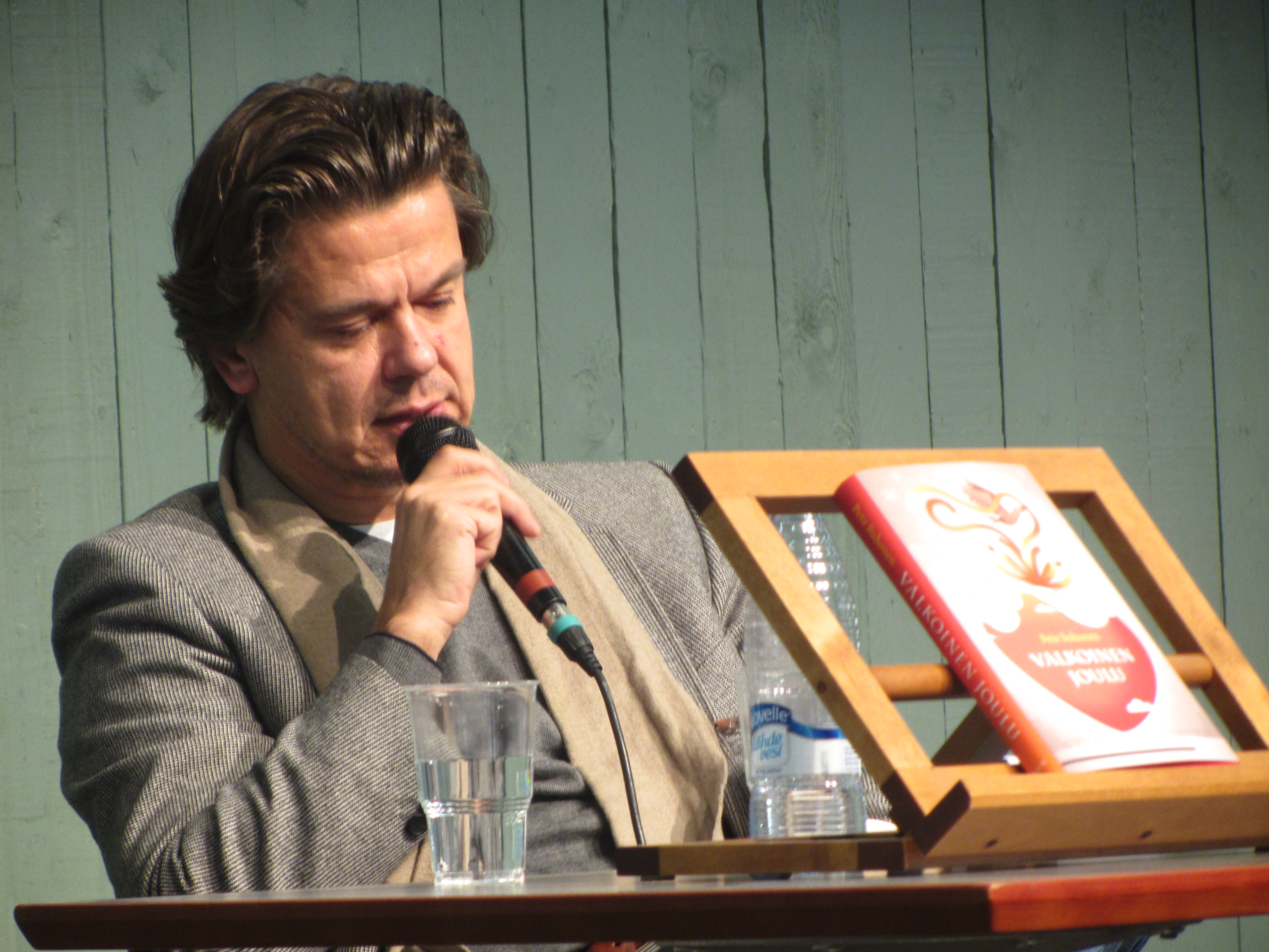 Pete Suhonen Helsingin Kirjamessuilla 2013.